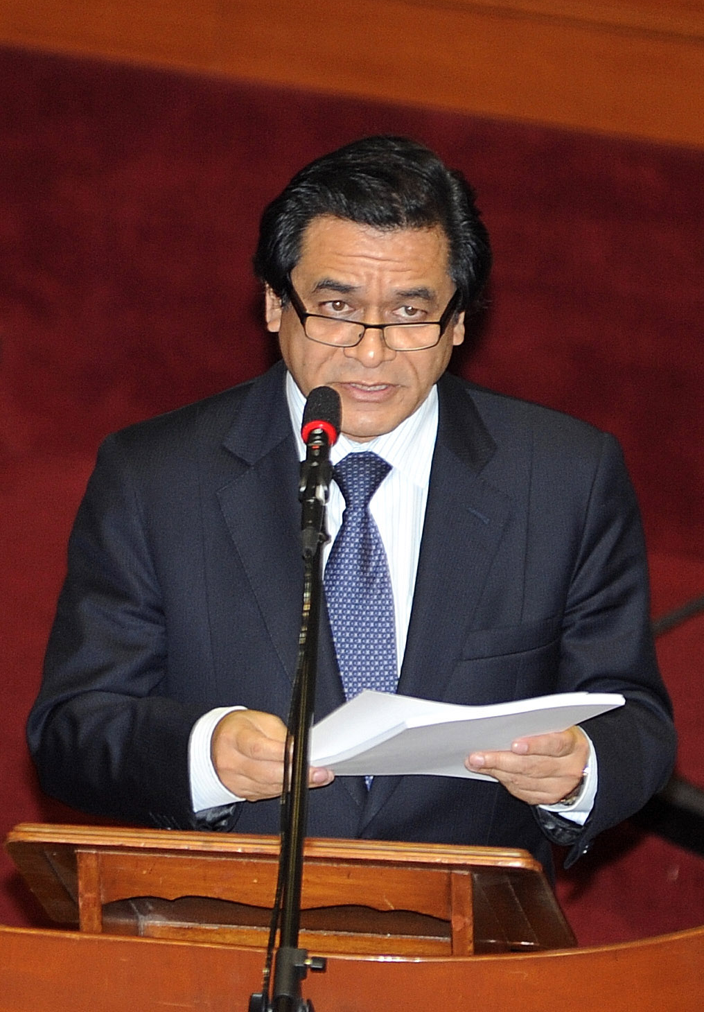 El presidente del Consejo de Ministros, José Chang Escobedo, expone ante el Pleno del Congreso la política general del gobierno y las principales medidas que requiere su gestión.